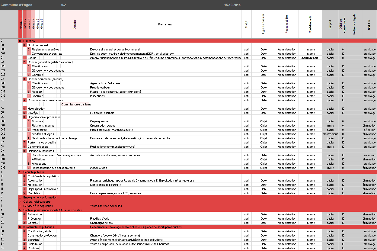 Plan d'archivage d'Enges